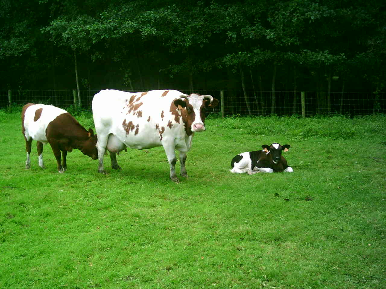 cows